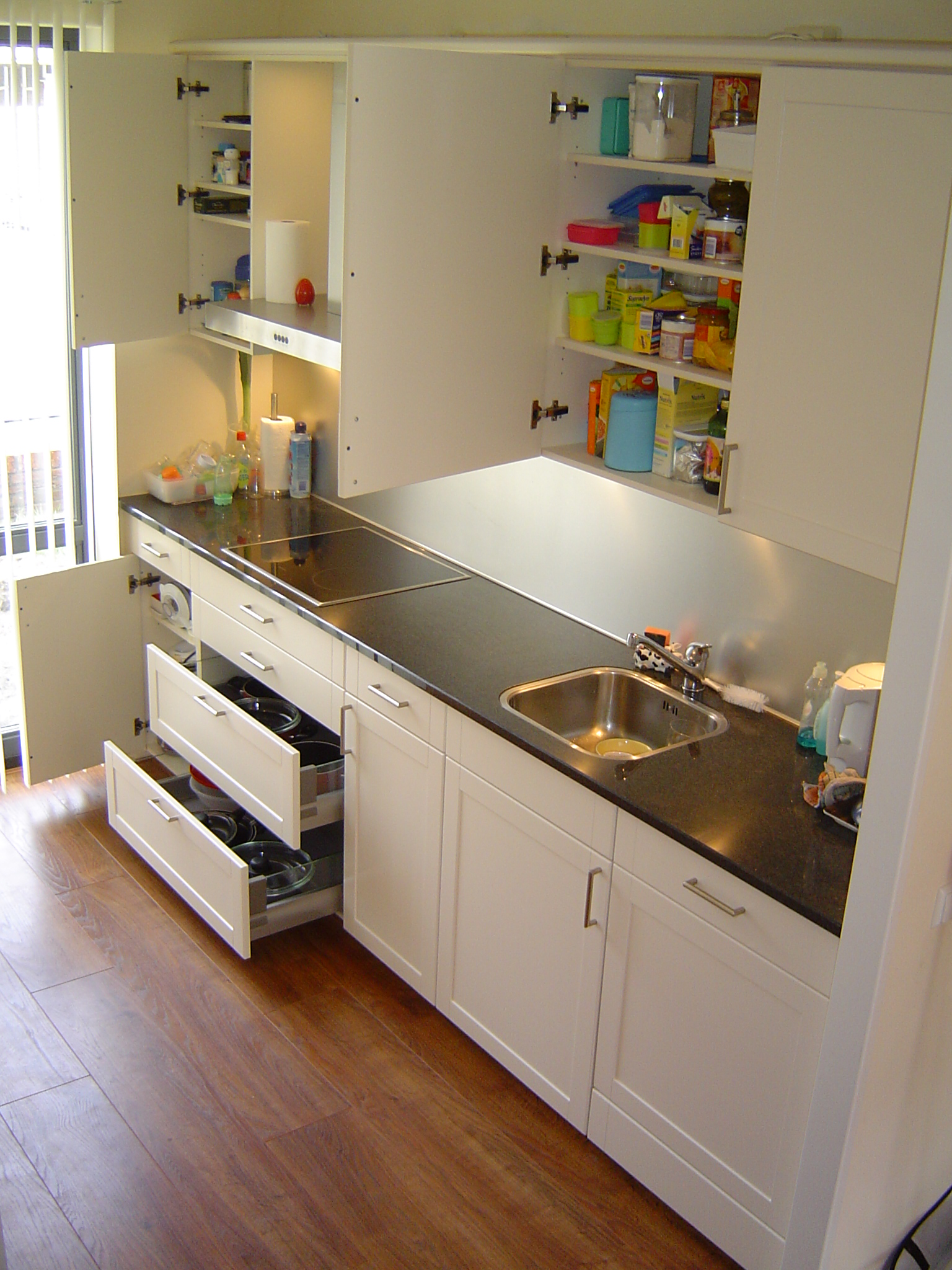 Kitchen